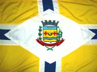 Bandeira de Valparaíso